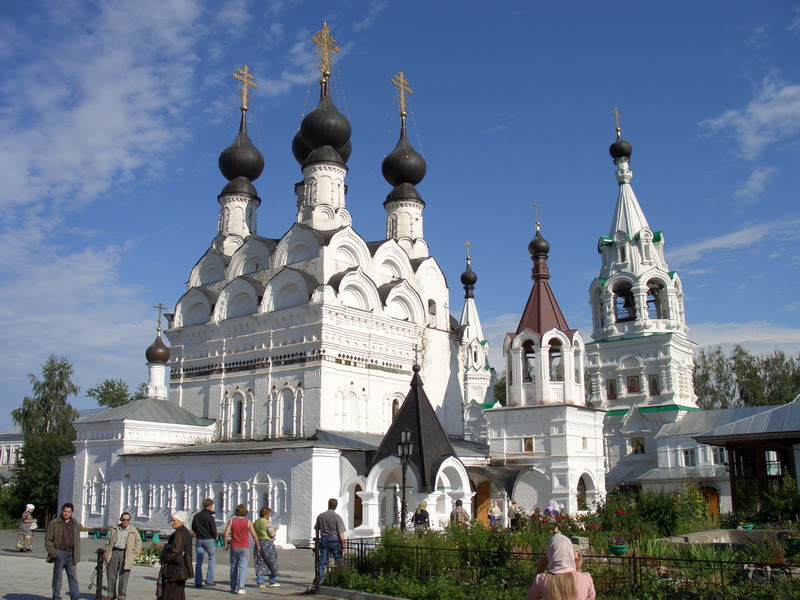 Лицензия